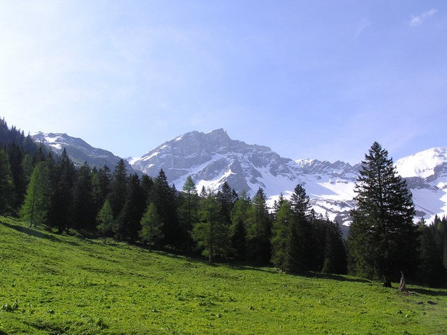 Naafkopf, von der Alp Glitsch gesehen